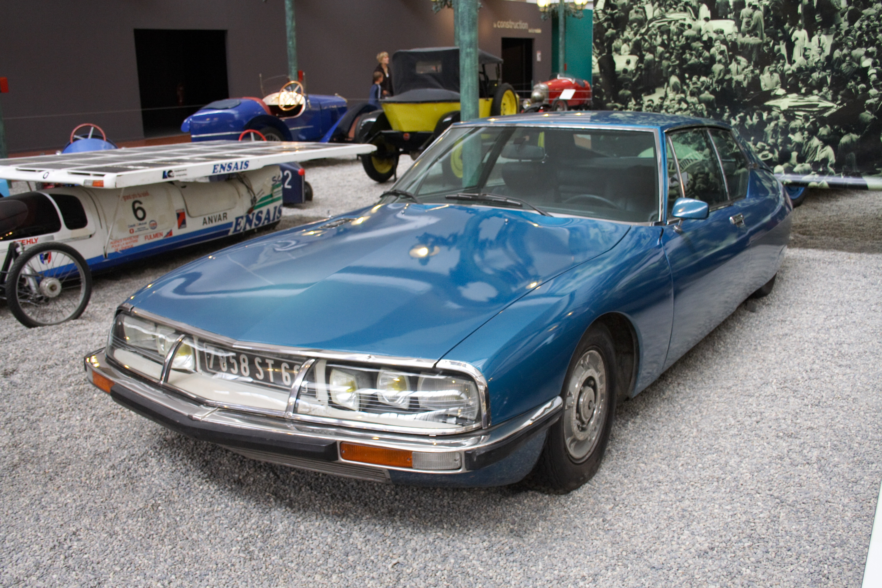 Citroen SM at the Musée National de l'Automobil(Mulhouse, France)